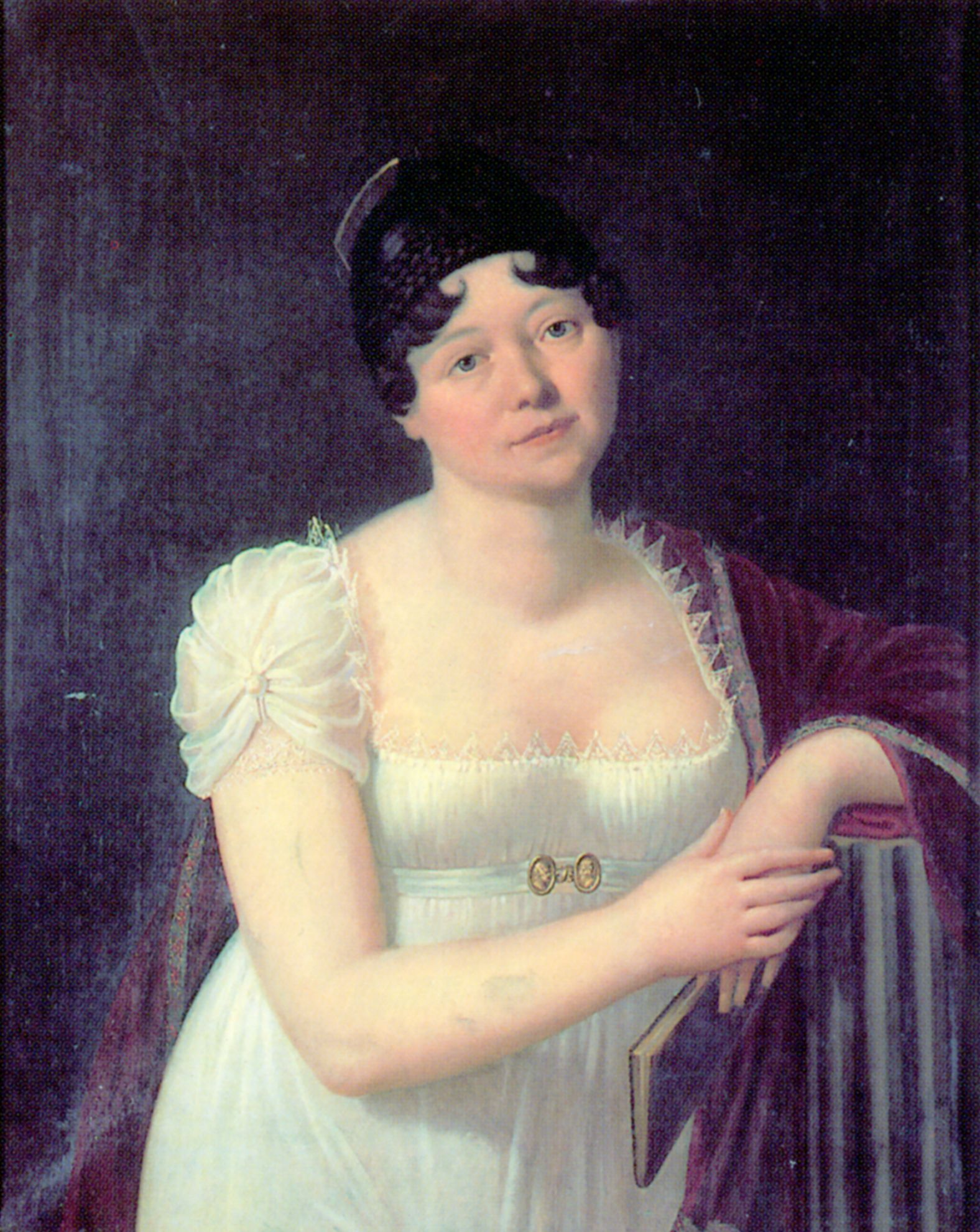 Portrait Caroline von Wolzogen; Öl auf Leinwand